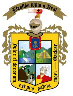 Escudo de Etzatlan, Estado de Jalisco